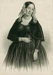 Catharine Simonsen, født Rysslaender (07.03.1816-03.05.1849)